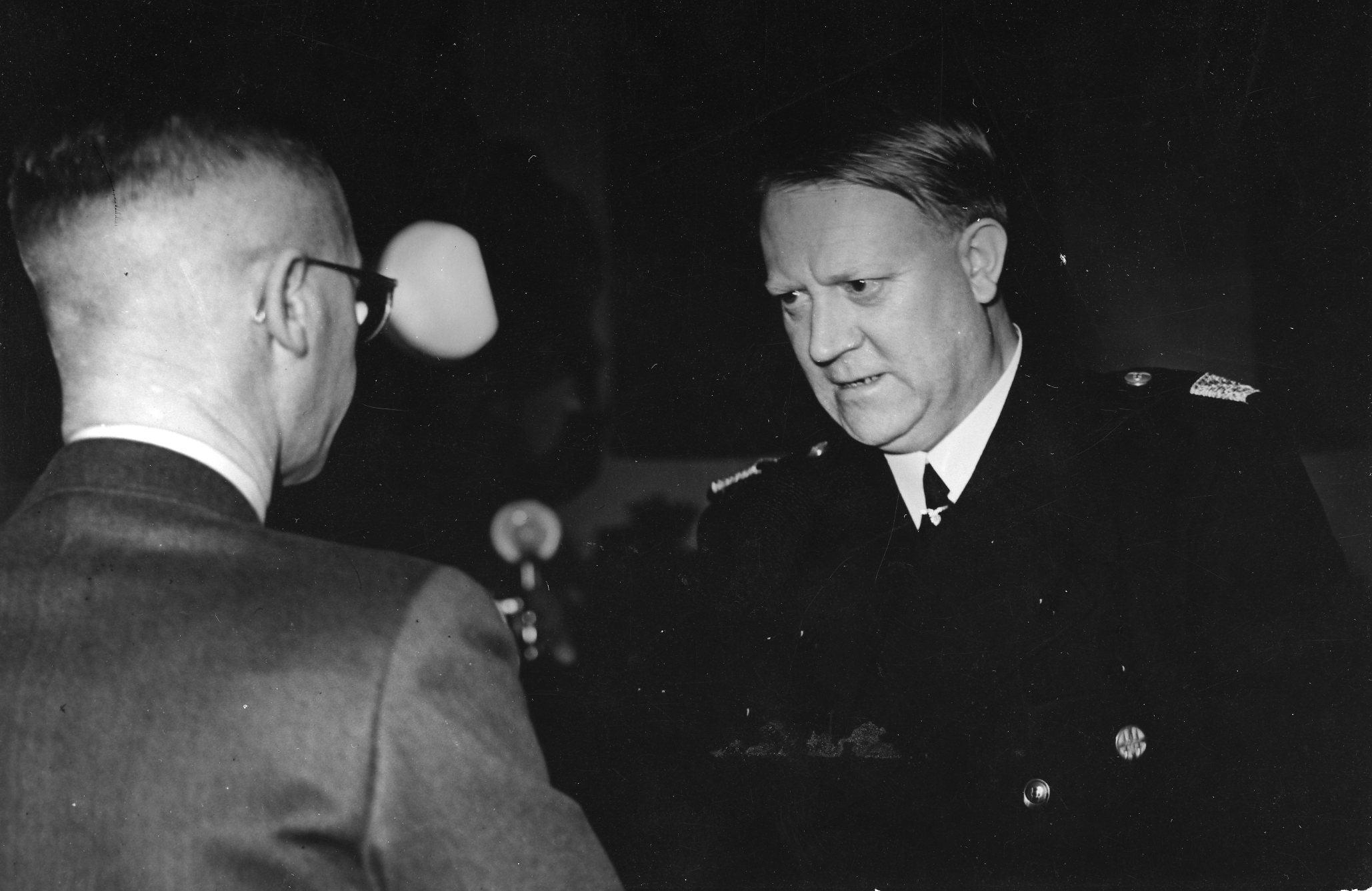 Anledningen er årsdagen for overtagelsen av regjeringsmakten. 1943/02/01. RA/PA-1209/Ue 91/ img031 «Statsakten» var en seremoni på Akershus slott i Oslo under andre verdenskrig 1. februar 1942 da rikskommissar Josef Terboven innsatte Vidkun Quisling, leder for Nasjonal Samling (NS), som «ministerpresident» i Norge, og de tyskkontrollerte kommissariske ministerne ble erstattet av «den nasjonale regjering» utgått fra NS. «Statsakten» markerte at Quisling fikk den formelle makta i Norge, og ved lov av 12. mars 1942 ble NS «statsbærende parti». Quisling hadde håp om at ordninga også skulle gi NS reell makt og føre til fred mellom Norge og Tyskland, men tysk tilsynsforvaltninga gjennom Reichskommissariat Norwegen fortsatte som før inntil frigjøringa 8. mai 1945.